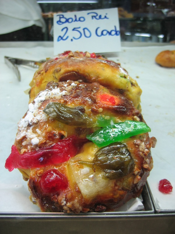 A traditional Portuguese cake.